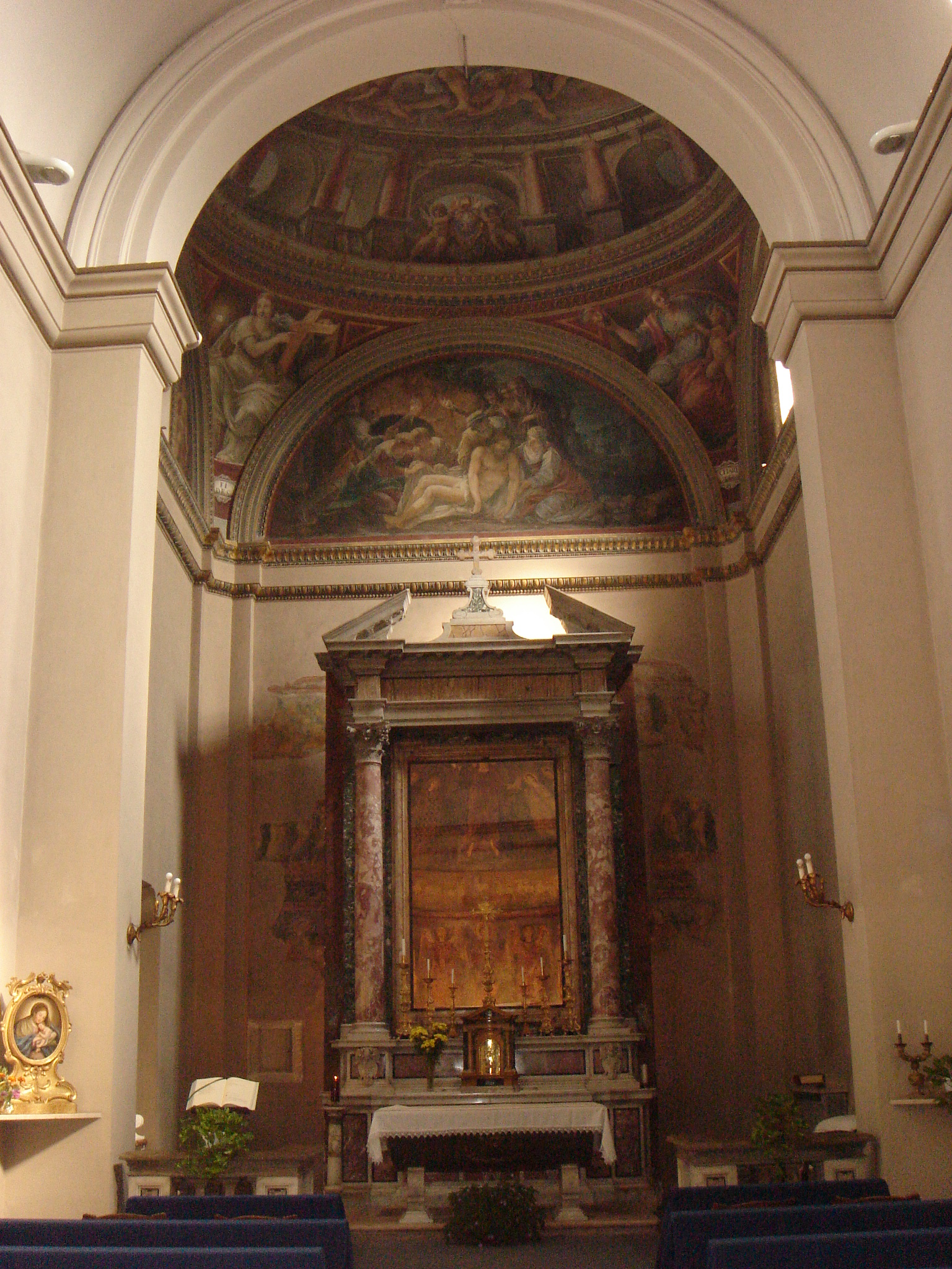 Roma, San Sebastiano al Palatino: interno. Catino absidale di Bernardino Gagliardi.